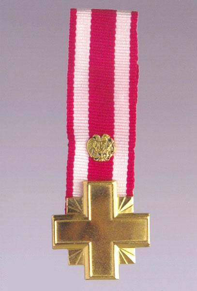 ՀՀ 1-ին աստիճանի Մարտական խաչ շքանշան.